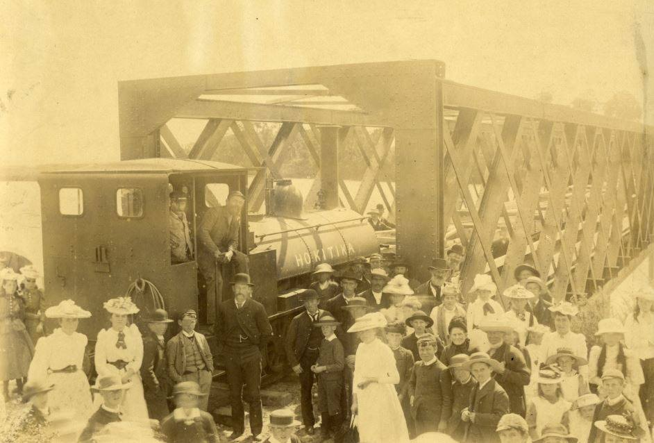 Taramakau road rail bridge opening